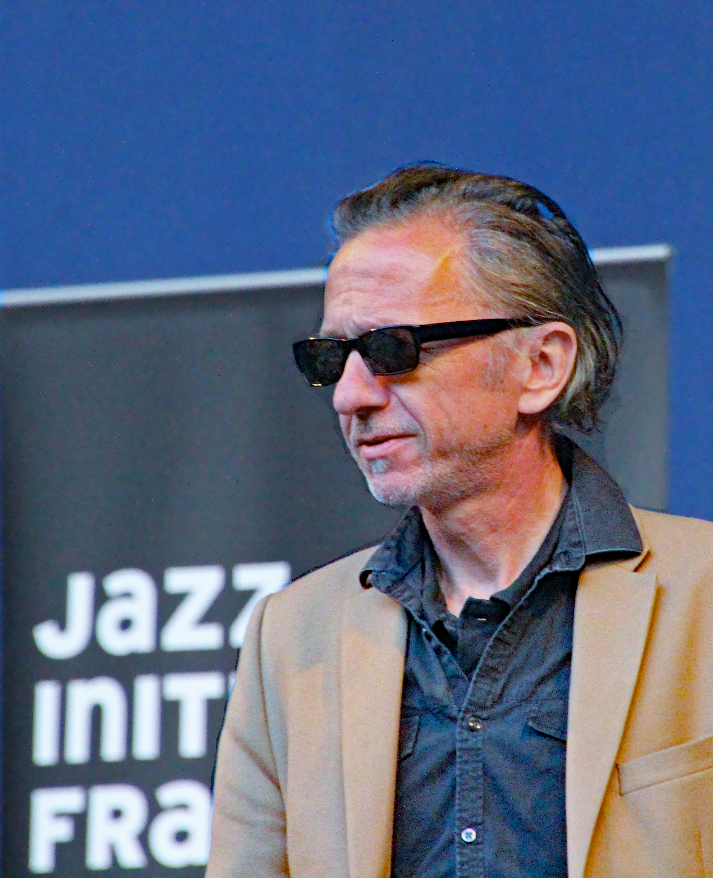 Bildinhalt: Johannes Fink bei Jazz im Palmengarten Aufnahmeort: Frankfurt am Main, Deutschland Die dargestellte Person wurde bei einem öffentlichen Auftritt fotografiert.